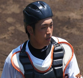 giants_yoshikawa